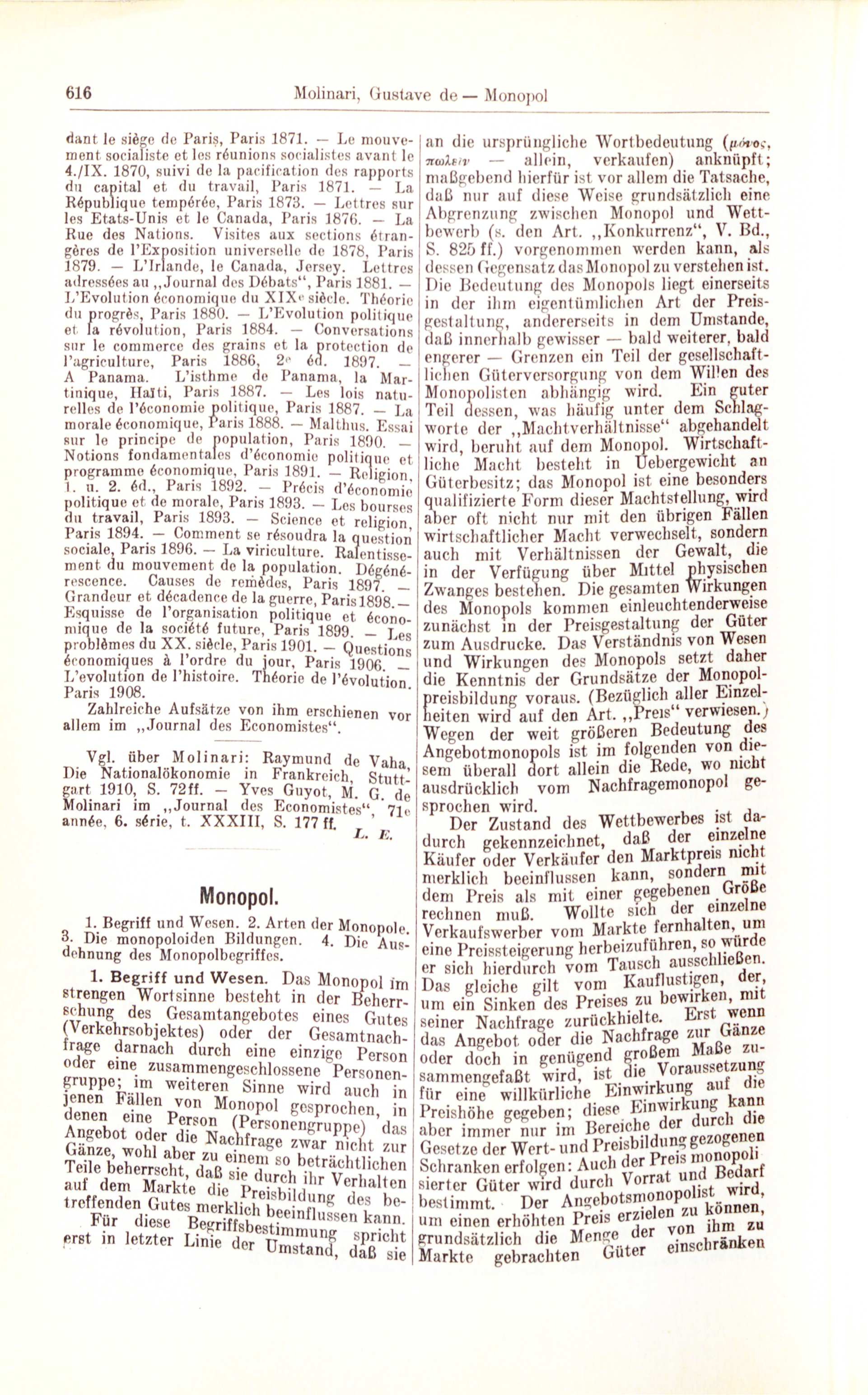 Franz Xaver Weiss Artikel Monopol in Handwörterbuch der Staatswissenschaften, 4. Auflage, Band 6, 1925, S. 616-623